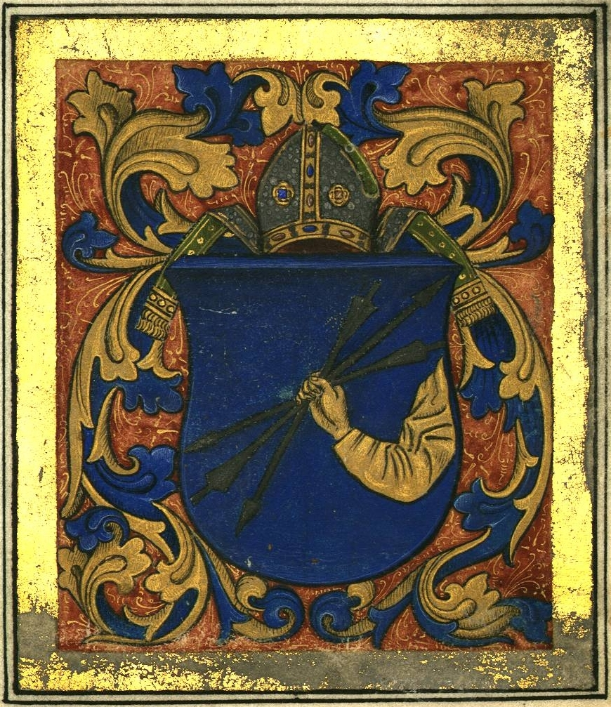 Sánkfalvi Antal pozsonyi prépost címere